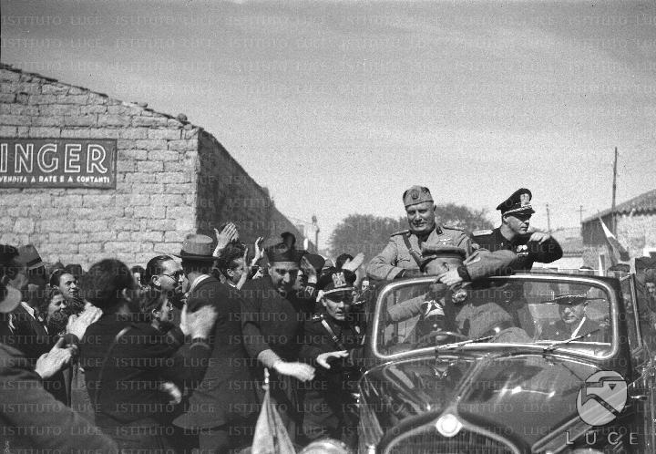 Foto storica ricavata dagli archivi pubblici dell'Istituto Luce Cinecittà. Ritrae Benito Mussolini in visita nella cittadina gallurese di Calangianus.